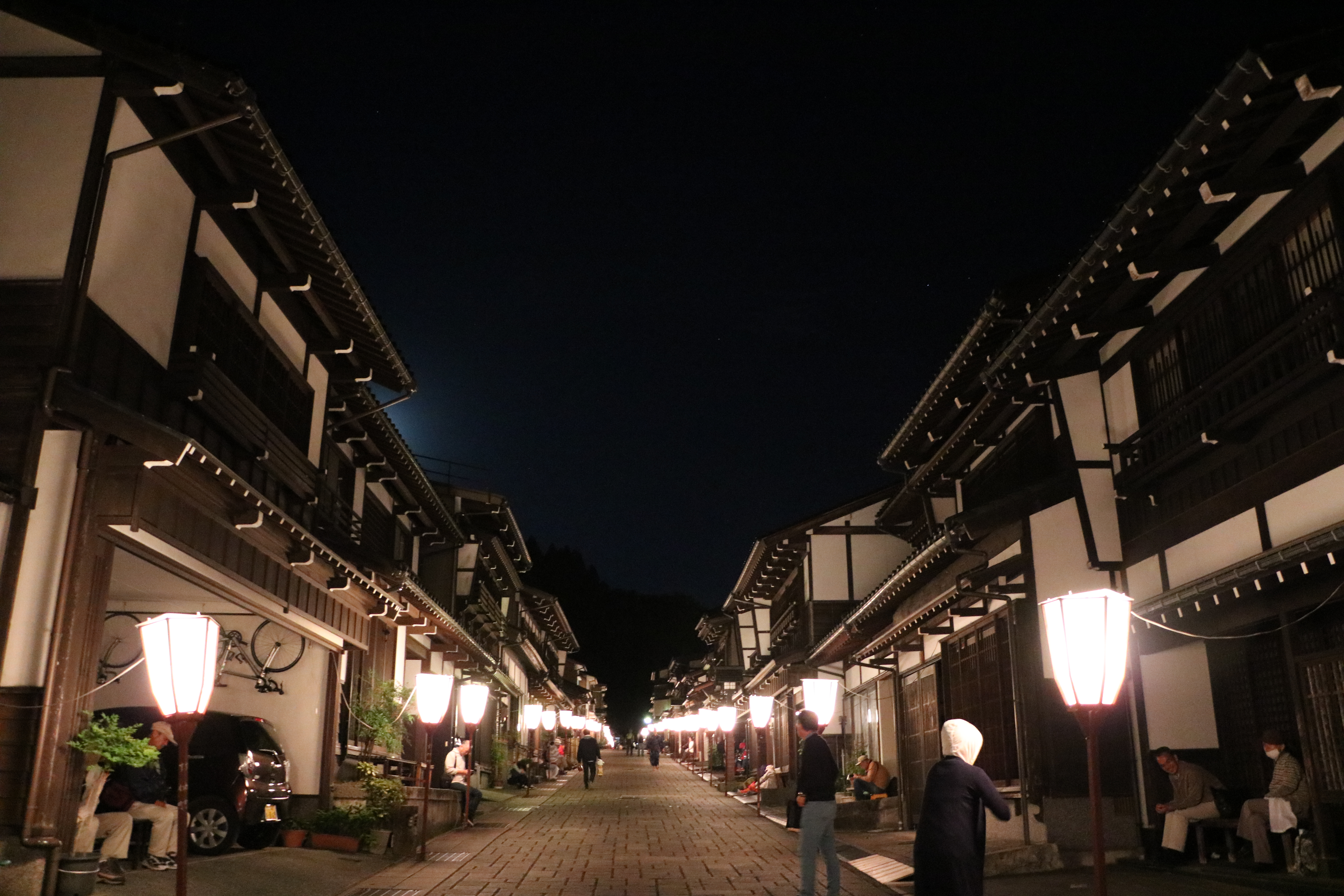 おわら風の盆。2017年9月3日深夜（日付が変わって4日）の諏訪町。富山県富山市八尾町。